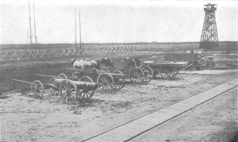 Photograph of French Mortier de 280mm Schneider barrel & carriage disassembled and loaded on its 4 transport carts. See also : Image:Mortier de 280 Schneider In Action.jpeg Image:Mortier de 280 Schneider Loading.jpeg Image:Mortier de 280 Schneider Elevated.jpg Image:Mortier de 280 Schneider Elevated Left Rear View.jpg